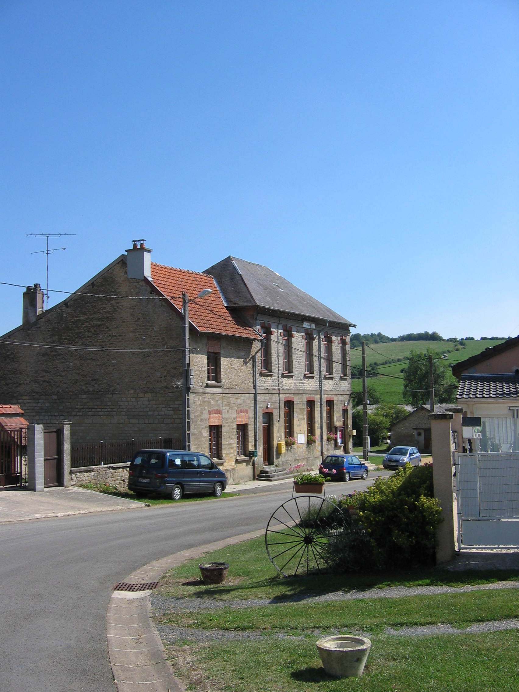 Létanne, mairie